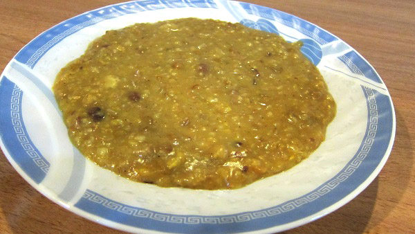 دنیک، نوعی آش گندم